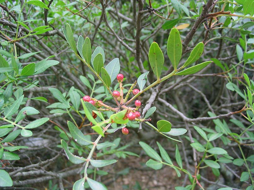 Pistacia lentiscus (pistachier lentisque). Photo prise à Ille-sur-Têt (66)